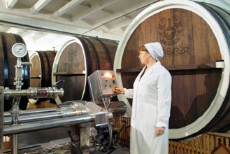 Фильтрационный аппарат в цехе выдержки